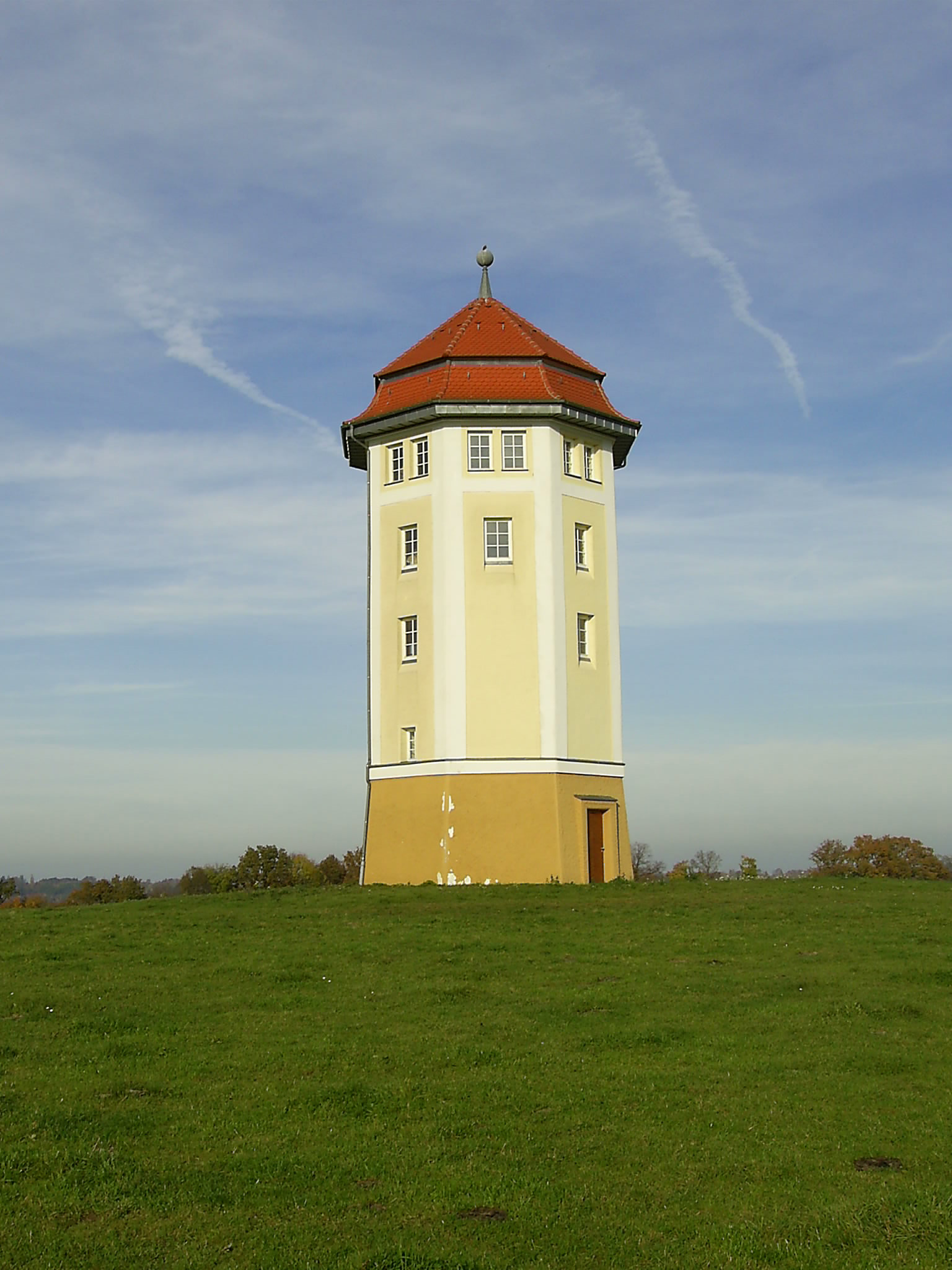 Wasserturm bei Hohenstadt, Gde. Abtsgmünd, Ostalbkreis, Baden-Württemberg, Deutschland